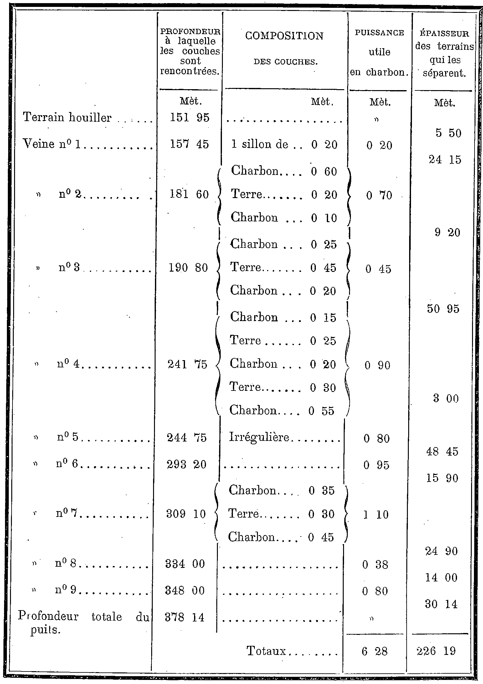 Veines recoupées à la fosse n° 2 de la Compagnie des mines d'Ostricourt.